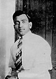 G.D. Boaz as a young man